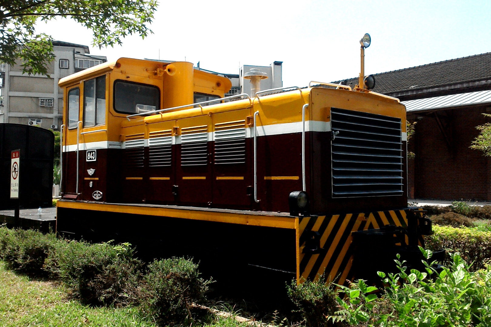 糖廍文化園區內展示的843號日立牌內燃機車,台北市萬華區大理次分區糖廍里